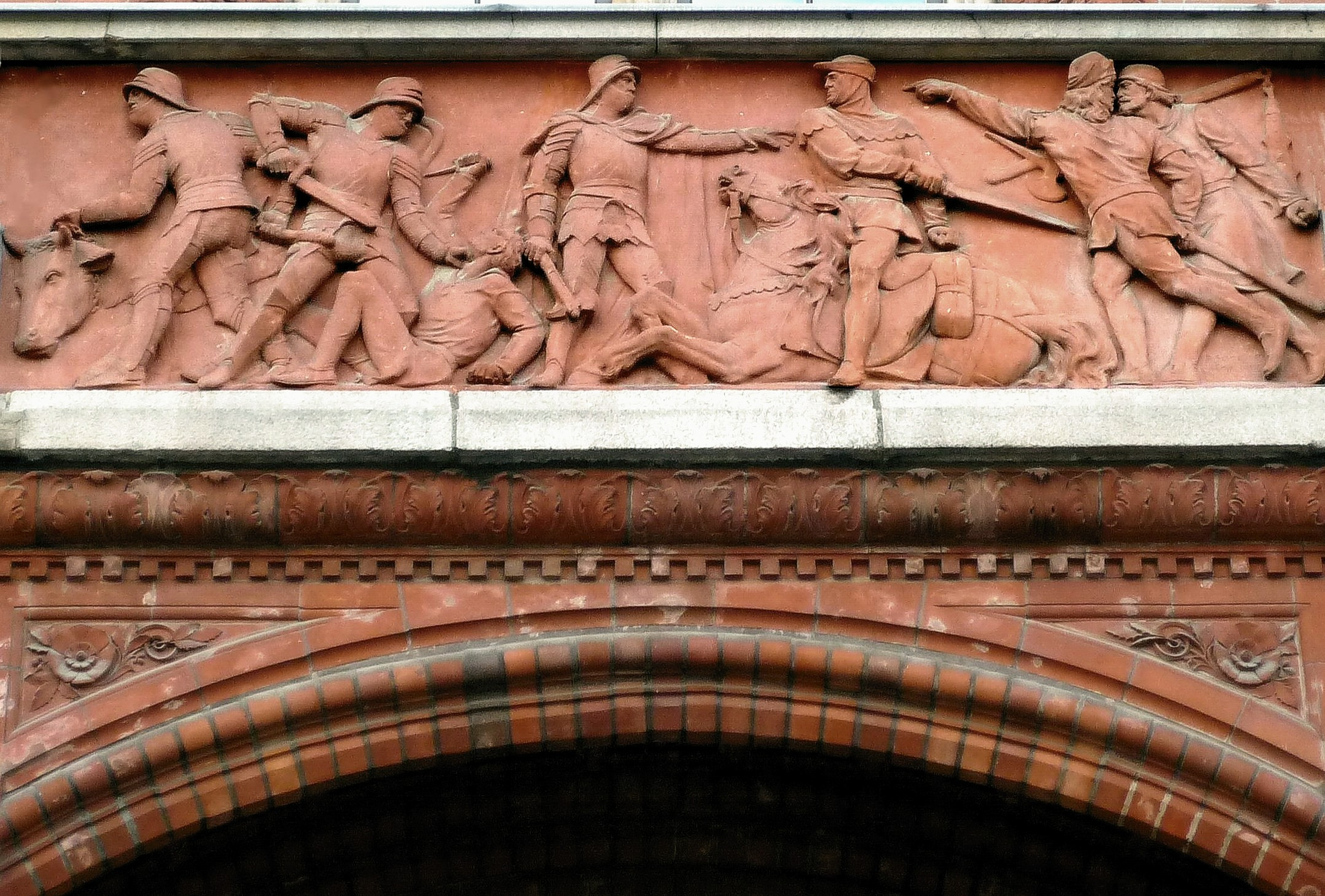 Das Rote Rathaus in Berlin-Mitte, Fassade Rathausstraße. Ausschnitt aus dem Terrakotta-Relief zur Berliner Stadtgeschichte, Thema hier: Die Fehde der Quitzows.